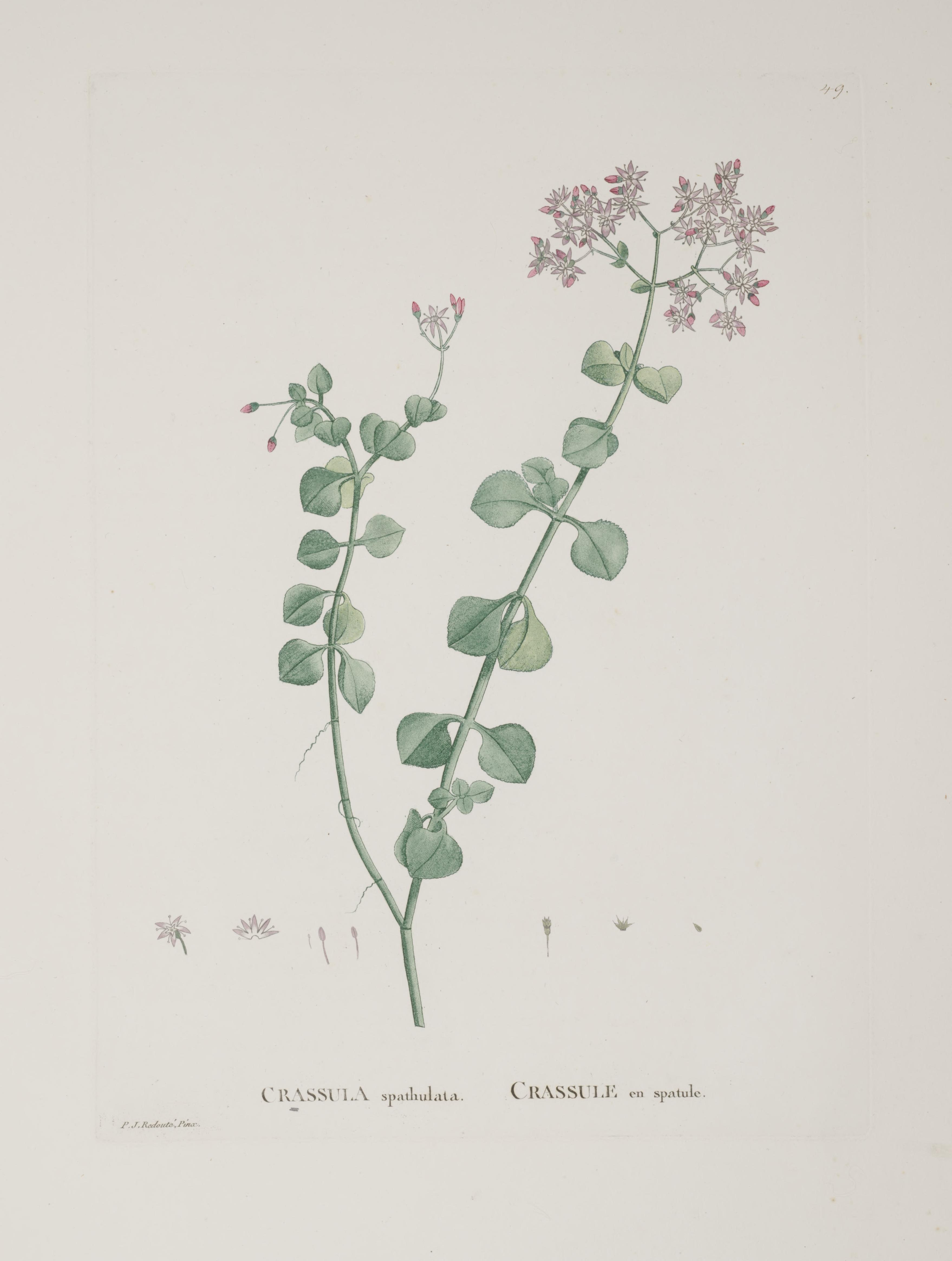 Crassula spathulata Thunb. Plantarum historia succulentarum =Histoire des plantes grasses /par A.P. Decandolle ; avec leurs figures en couleurs, dessinées par P.J. Redouté.